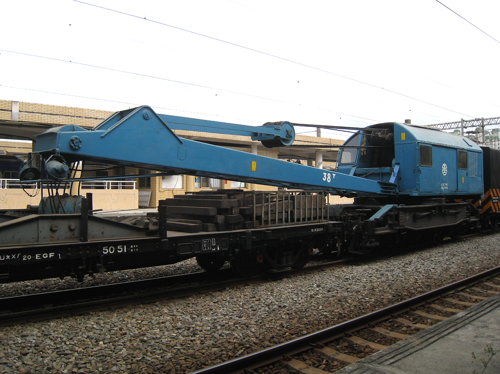 臺灣鐵路管理局高雄機務搶修隊所屬之38噸救險吊車與代用平車20EGF5051。